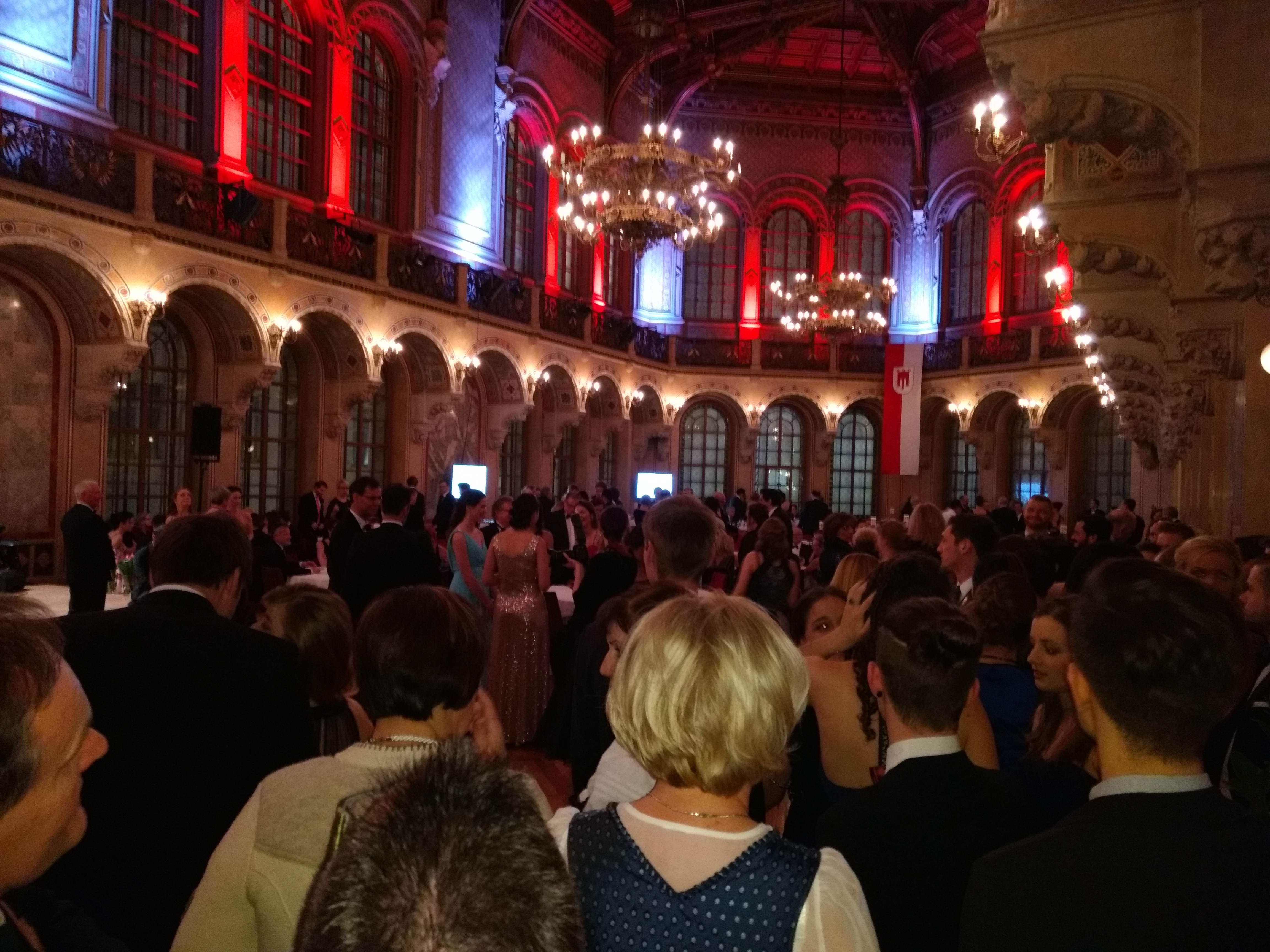 Ball der Vorarlberger in Wien am 28. Jänner 2017 im Wiener Palais Ferstel